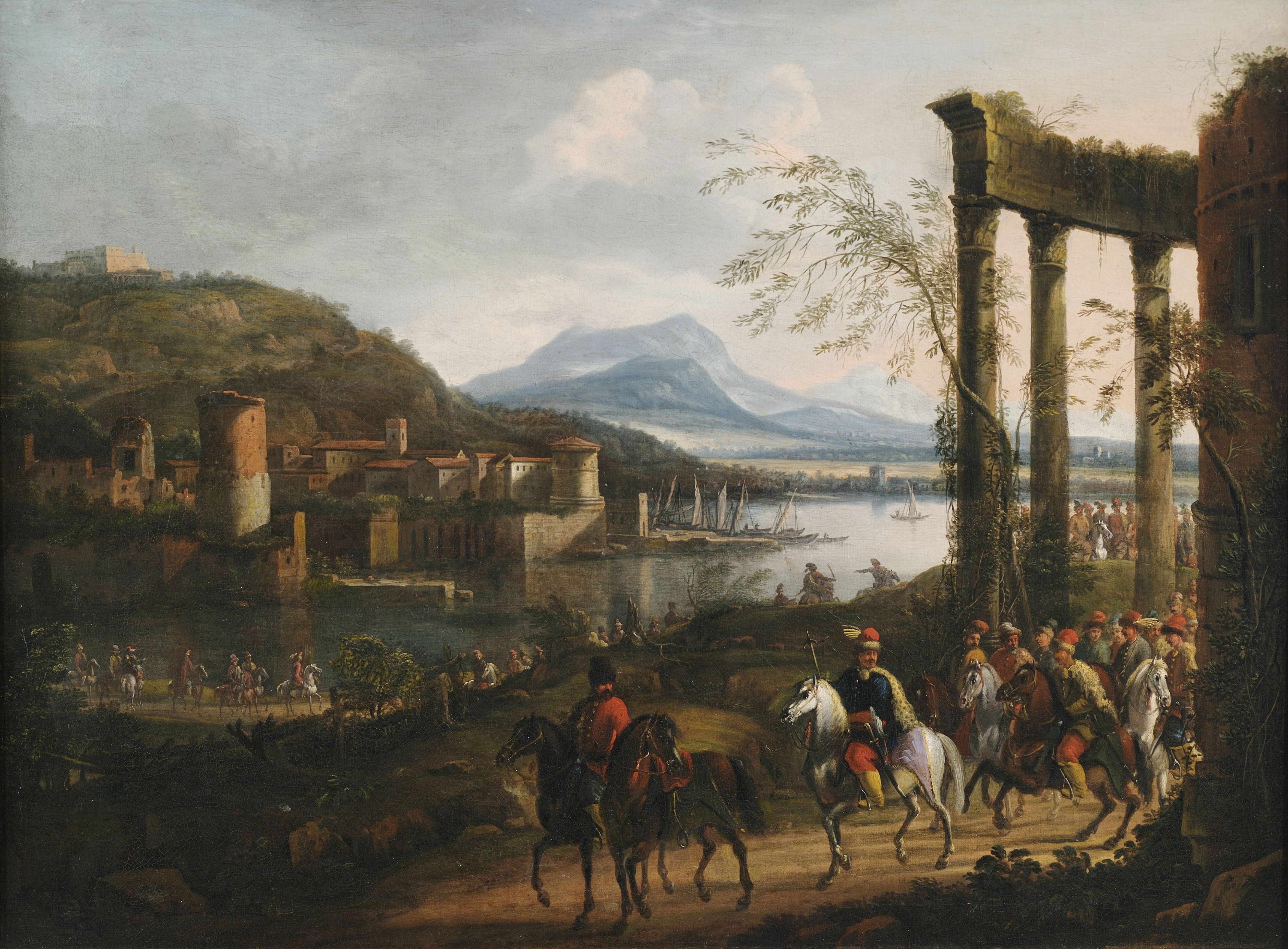 Weite italienisierende Flusslandschaft mit Ruinen, Hafenanlage und großem Reiterzug